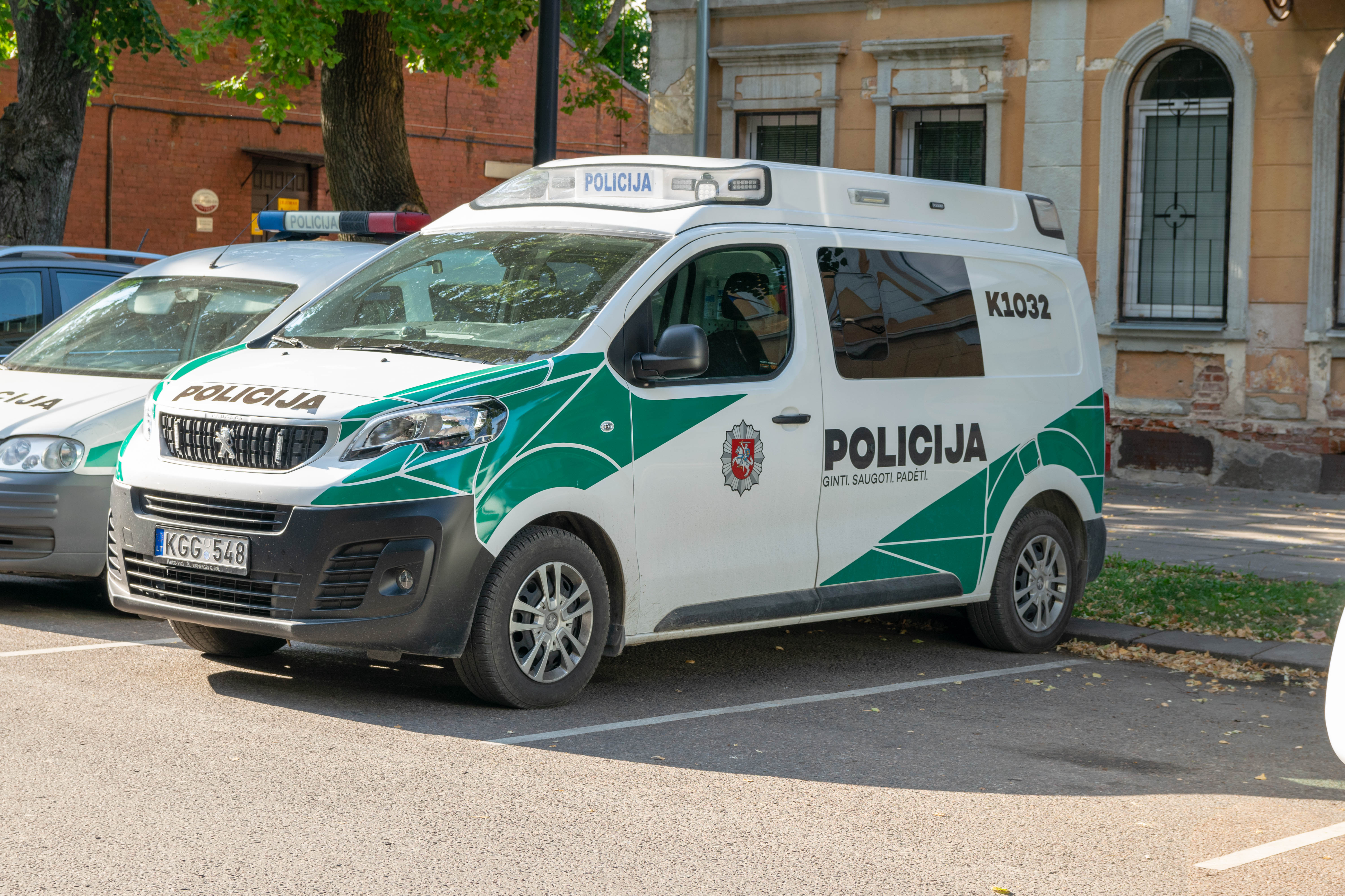 Van de la police lituanienne (Policija) de la marque Peugeot